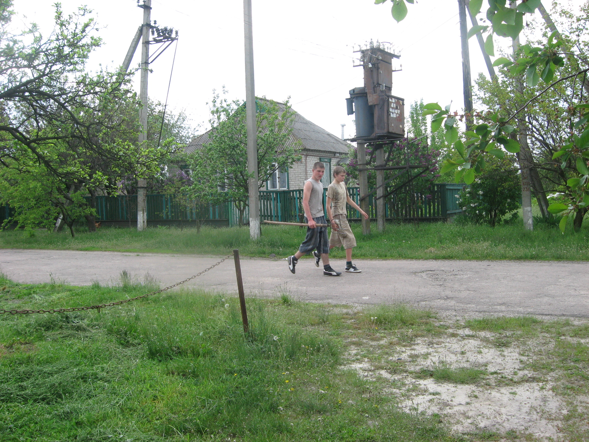 Булахівка